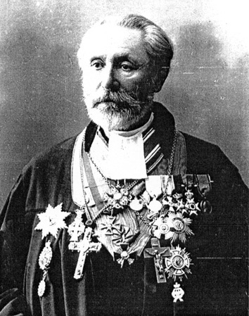 Обер-пастором Евангелическо-лютеранской церкви, организатор обучения и воспитания детей с нарушениями зрения в России